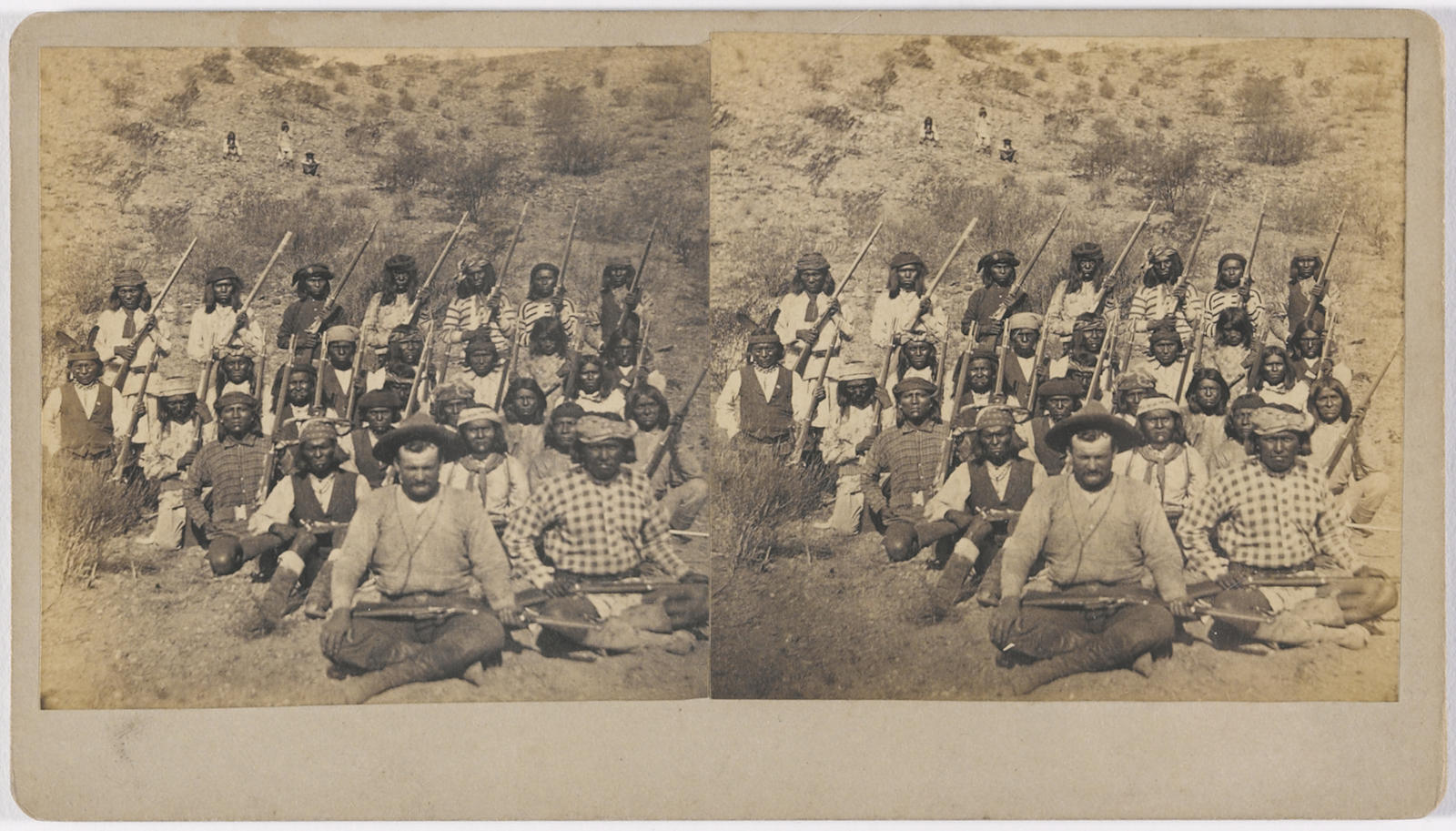 Al Sieber and Apache scouts